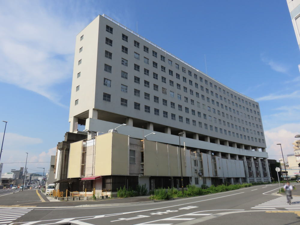 兵庫県姫路市の高尾アパート（旧 姫路モノレールの大将軍駅）